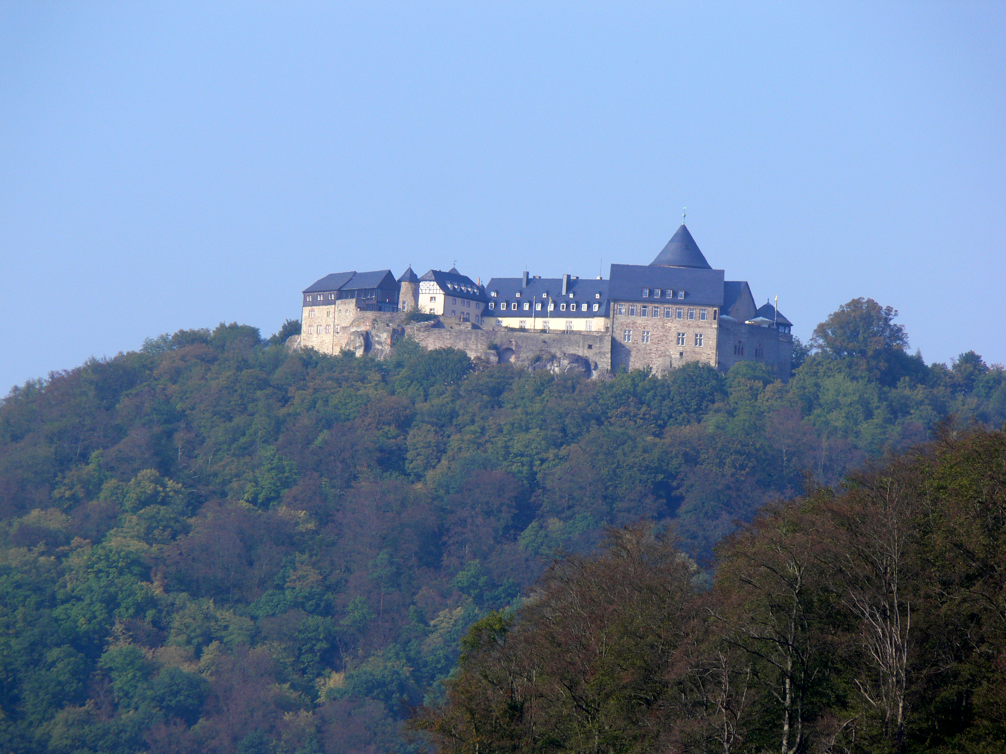 Burg Waldeck vom Edersee aus